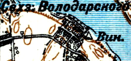 Топографическая карта Ленинградской области, квадрат Vc-29 (Батецкая), посёлок Володарское